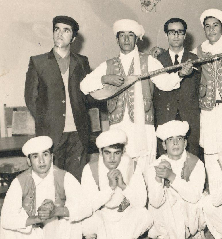 فاروق کیانی رقصنده محلی تربت جامی در جوانی